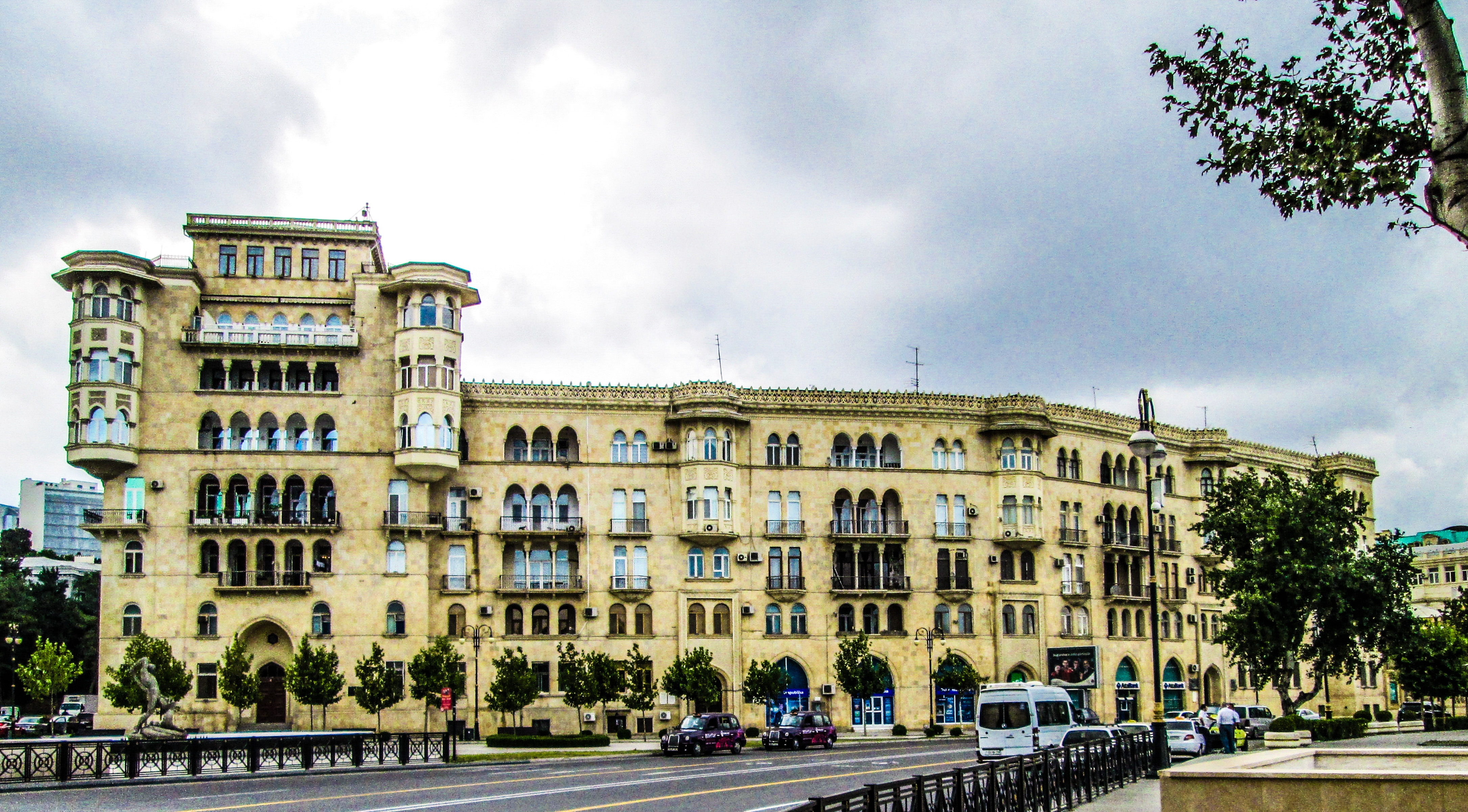 Neftçilər pros. 001